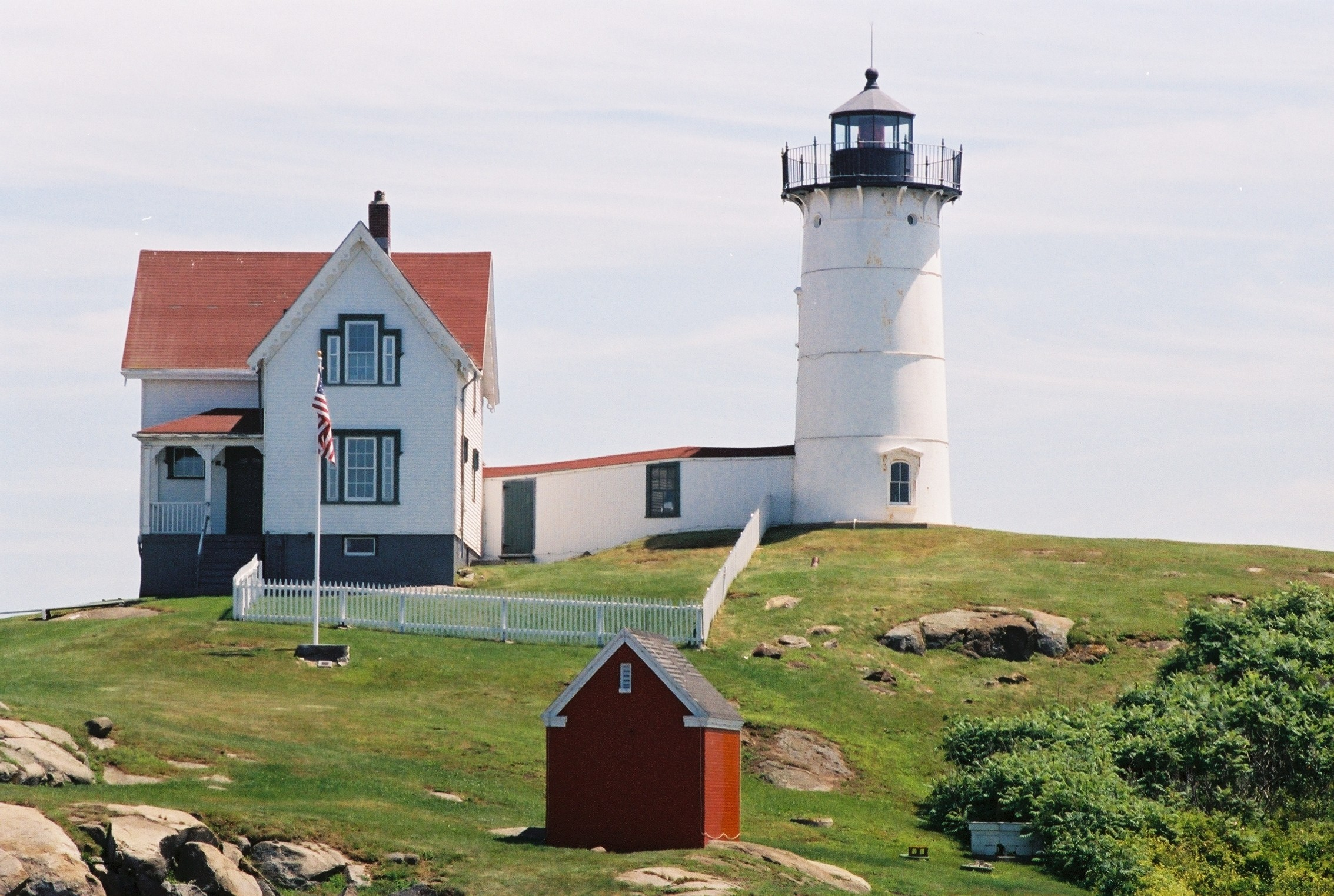 Auteur : FC Georgio Sujet : Nubble Lighthouse Lieu : Comté de York, État du Maine, USA Date : Juillet 2006